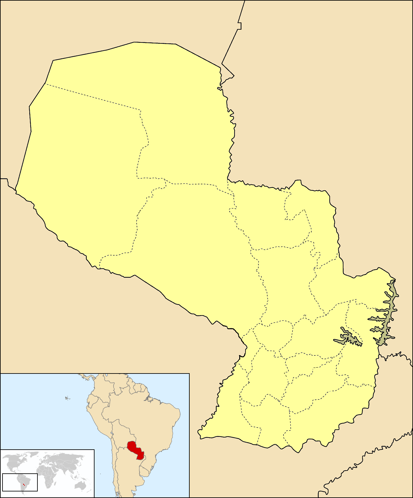 Mapa de Paraguay, en segundo plano ubicación en contexto sudamericano y mundial.